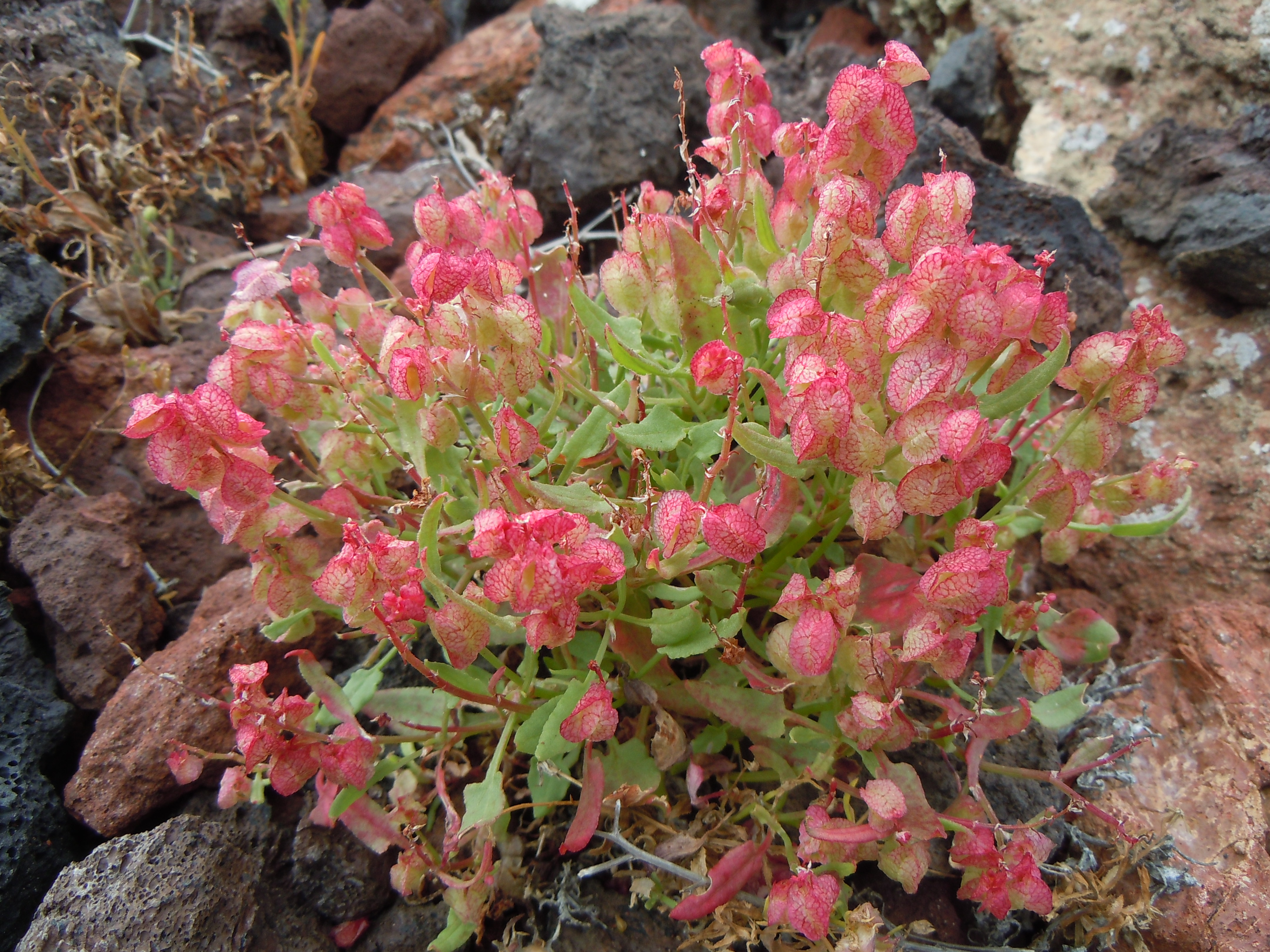 Rumex vesicarius Montana Bermeja, Lanzarote